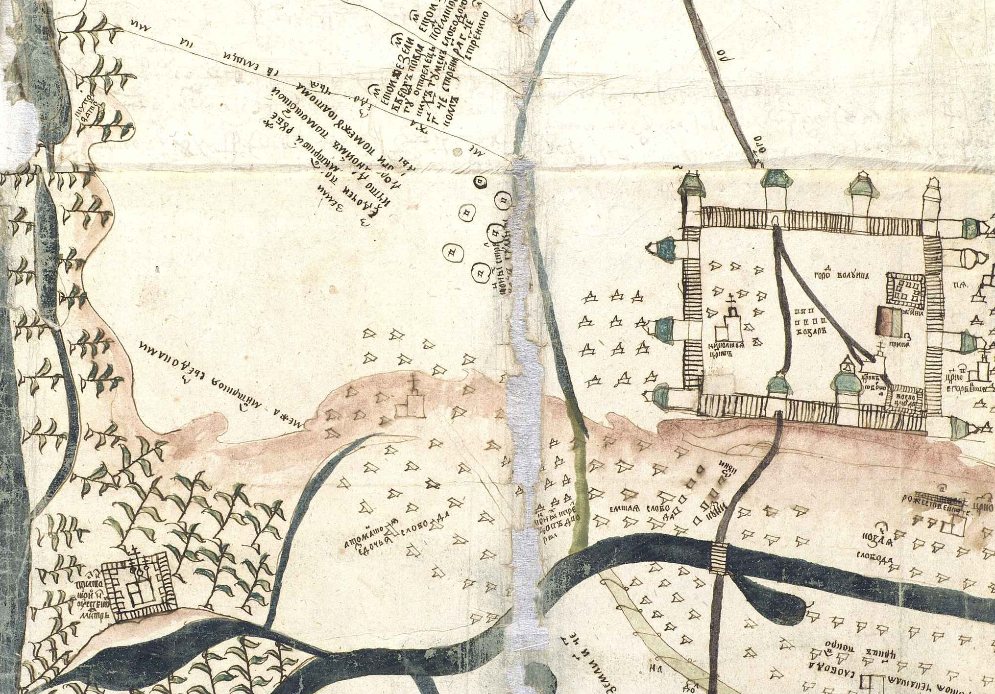 Фрагмент выполненного в красках чертежа, созданного в Поместном приказе в 1687 году в ходе разбирательства спорного дела валуйских стрельцов и пушкарей с ямщиками о поместных дачах за рекой Осколом. Изображены крепость и монастырь. Ф. 1209. Оп. 77. Ед. хр. 34699. РГАДА.